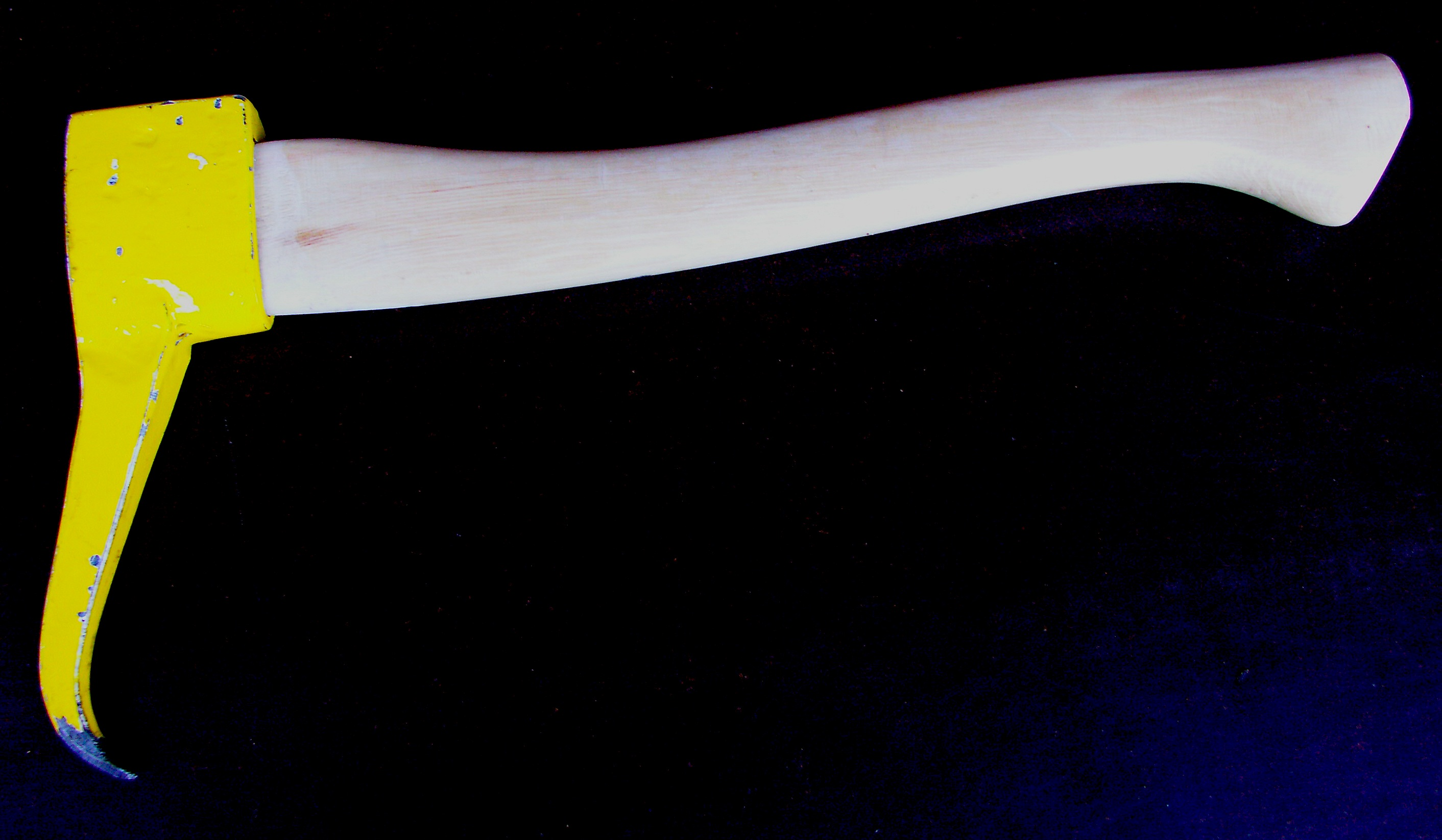 Handsappie der Fa. "Ochsenkopf"